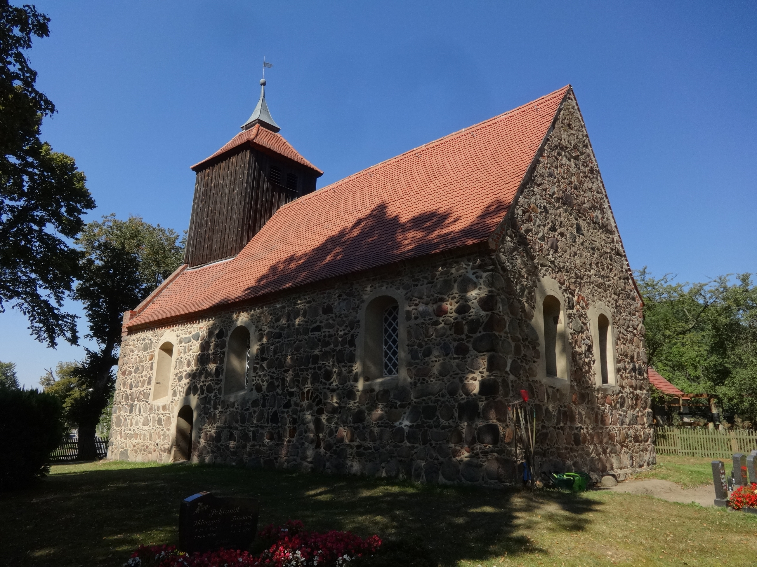 Die Dorfkirche in Liepe wurde vermutlich um 1300 aus Feldsteinen errichtet und 1734 barock überformt. In ihrem Innern befinden sich unter anderem eine Kanzel aus dem Anfang des 18. Jahrhunderts sowie ein Altarretabel aus der ersten Hälfte des 19. Jahrhunderts.